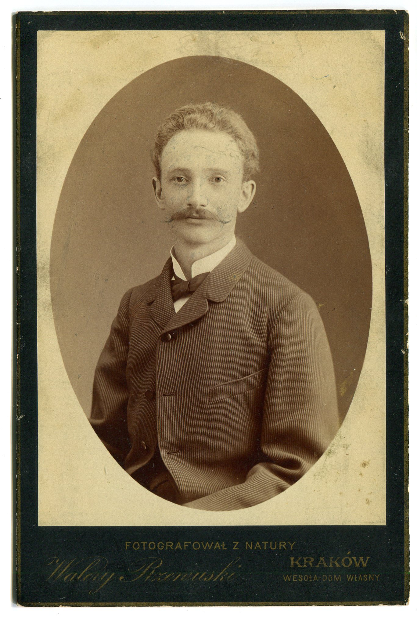 Dr Maciej Kwieciński (1853-1936), doktor medycyny, honorowy obywatel miasta Oświęcim, lekarz miejski w Białej. Fotografia z ok. 1882 r., wykonana w Pracowni Fotograficznej Walerego Rzewuskiego w Krakowie. Zbiory Łukasz Szymański.